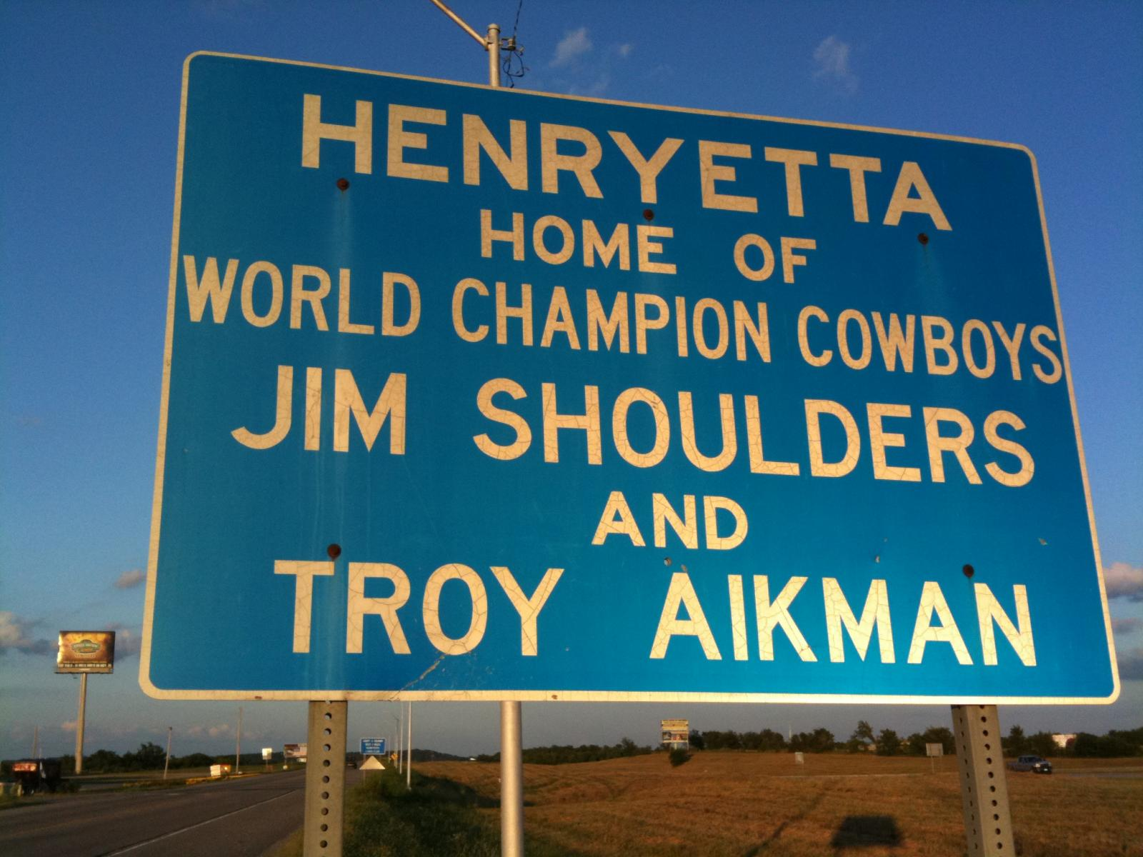 Henryetta, Oklahoma: Home of Jim Shoulders and Troy Aikman